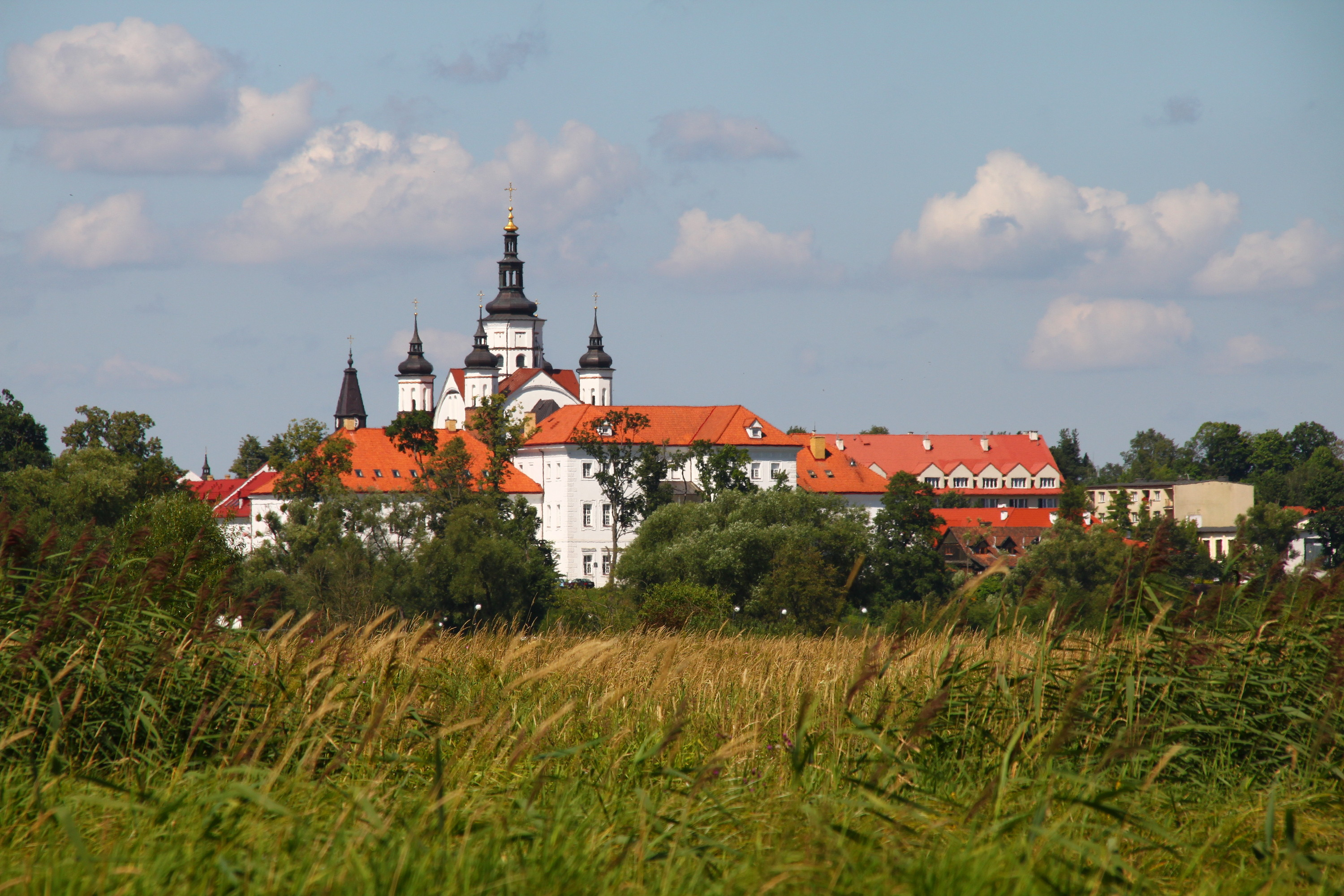 Supraśl, Monaster Zwiastowania Przenajświętszej Bogurodzicy i św. Jana Teologa w Supraślu Wikidata has entry Q2987314 with data related to this item.